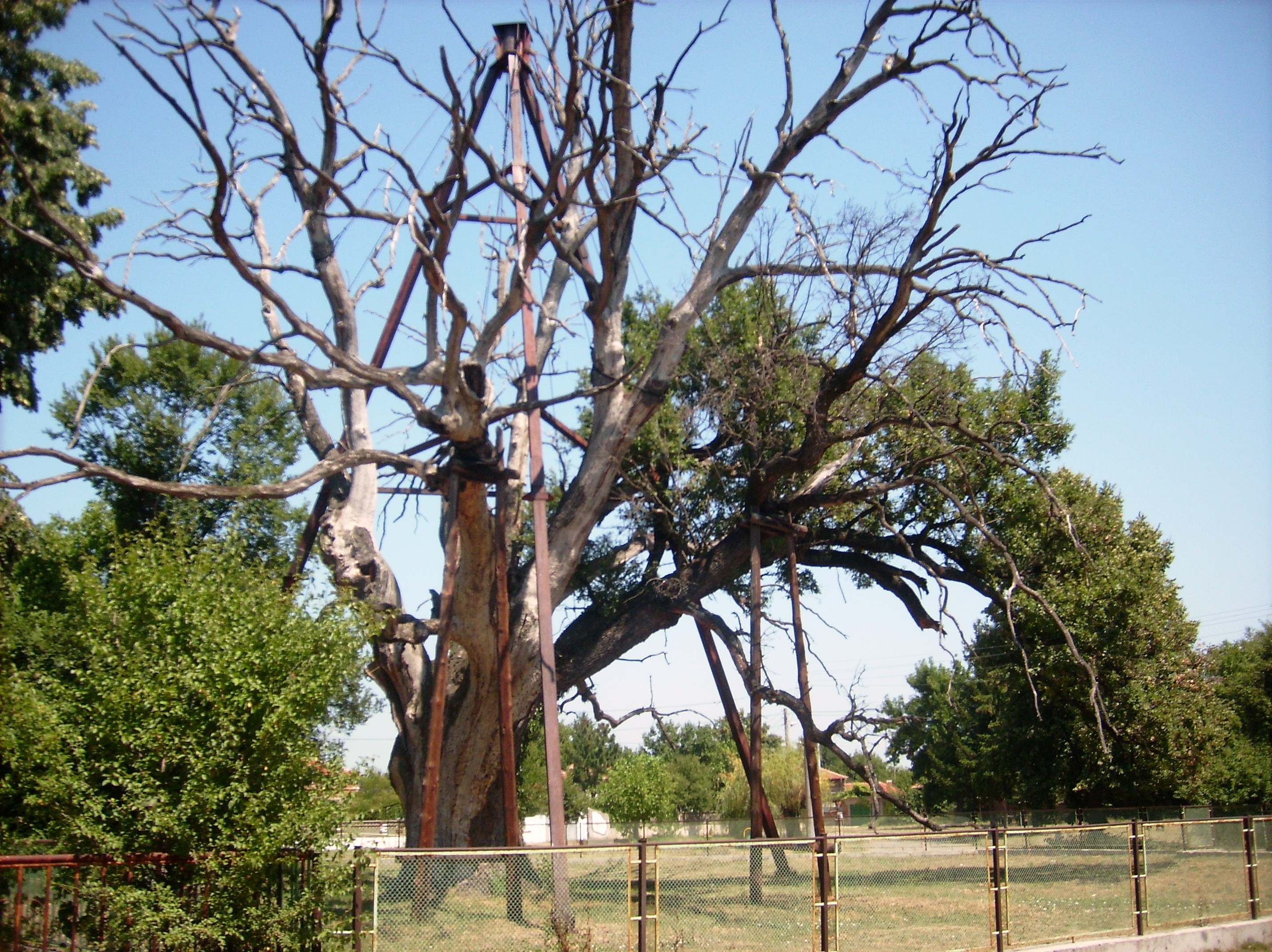 The Granit Oak